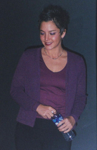 Verónica Segura, actriz Mexicana que interpreta a Cordé en el Episodio II de Star Wars, en una conferencia en la Tercera Convención de Star Wars México